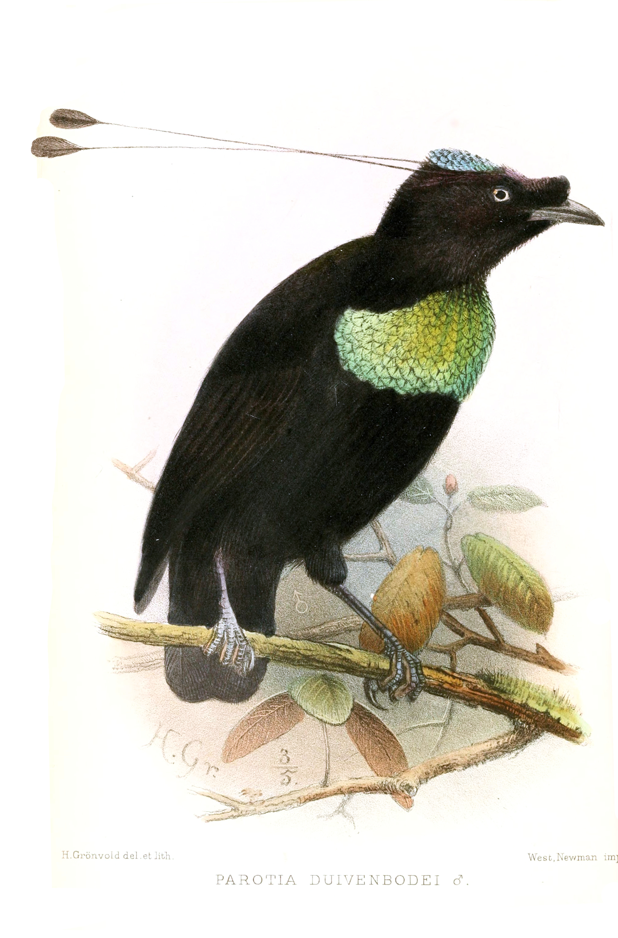 Parotia duivenbodei (male) = now Parotia sefilata x Lophorina superba